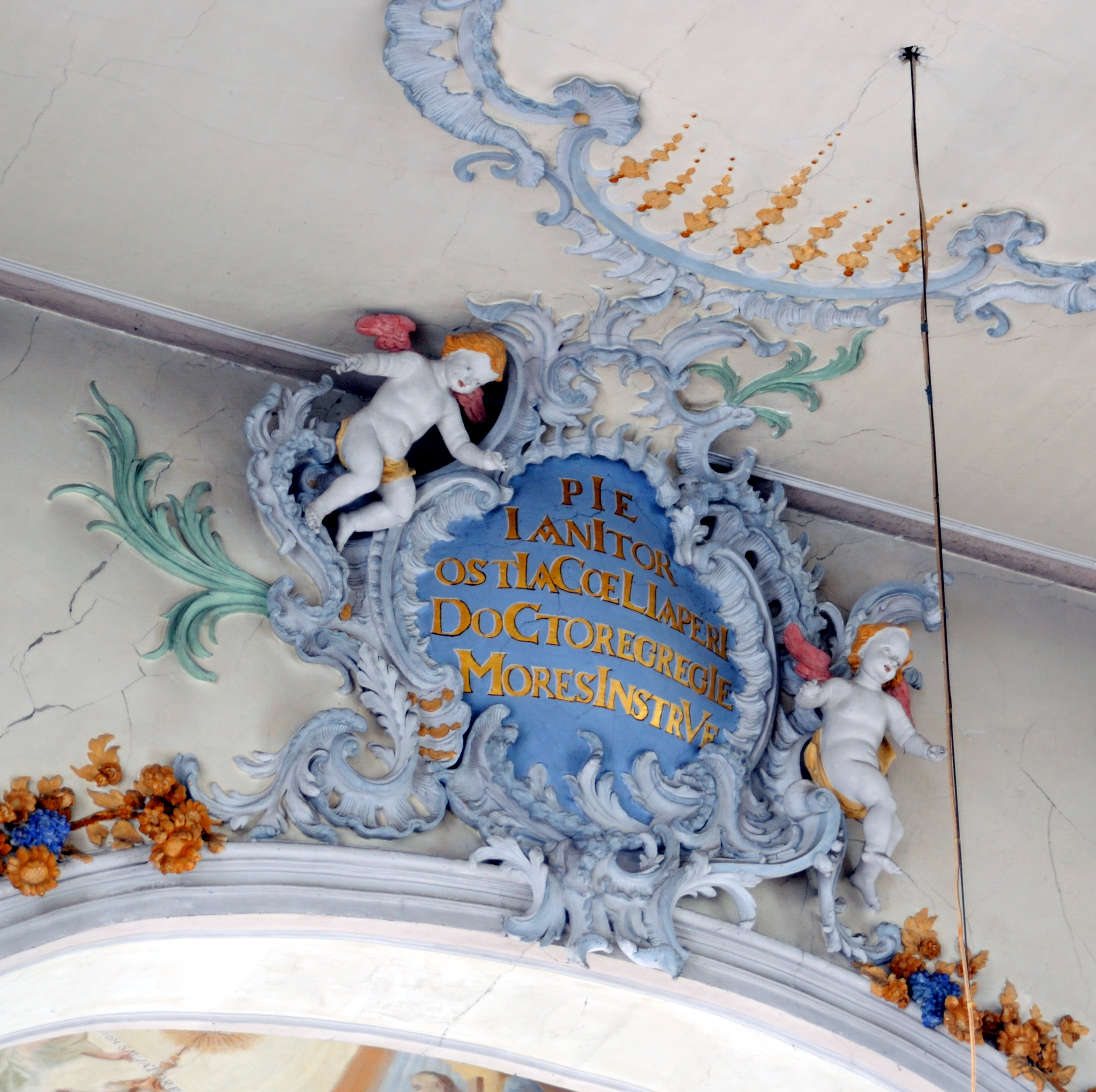 Rheinfelden-Minseln: Chronogramm